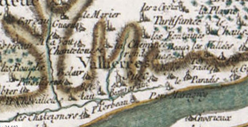 Extrait de la carte de Cassini. Ici : l'ancienne commune devenue quartier Vallières, les sites de la Chevalette, les Pivotières et la Plaine. Commune de Fondettes.